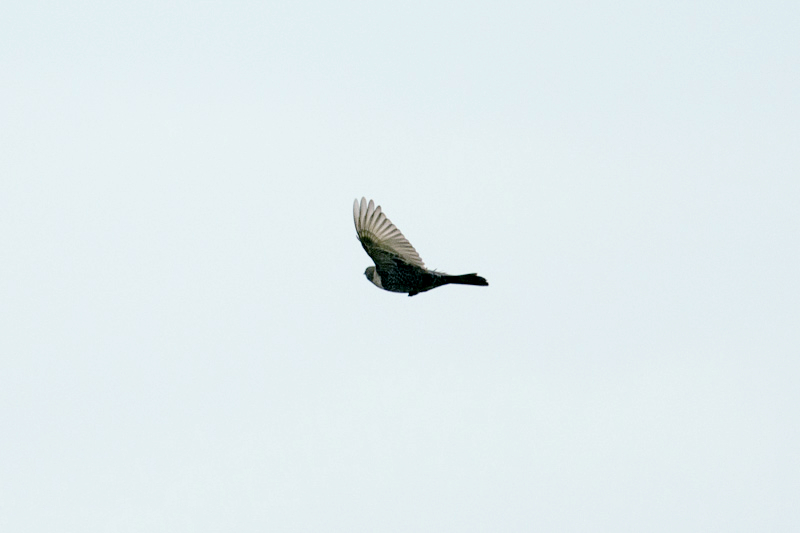 beflijster-1.jpg